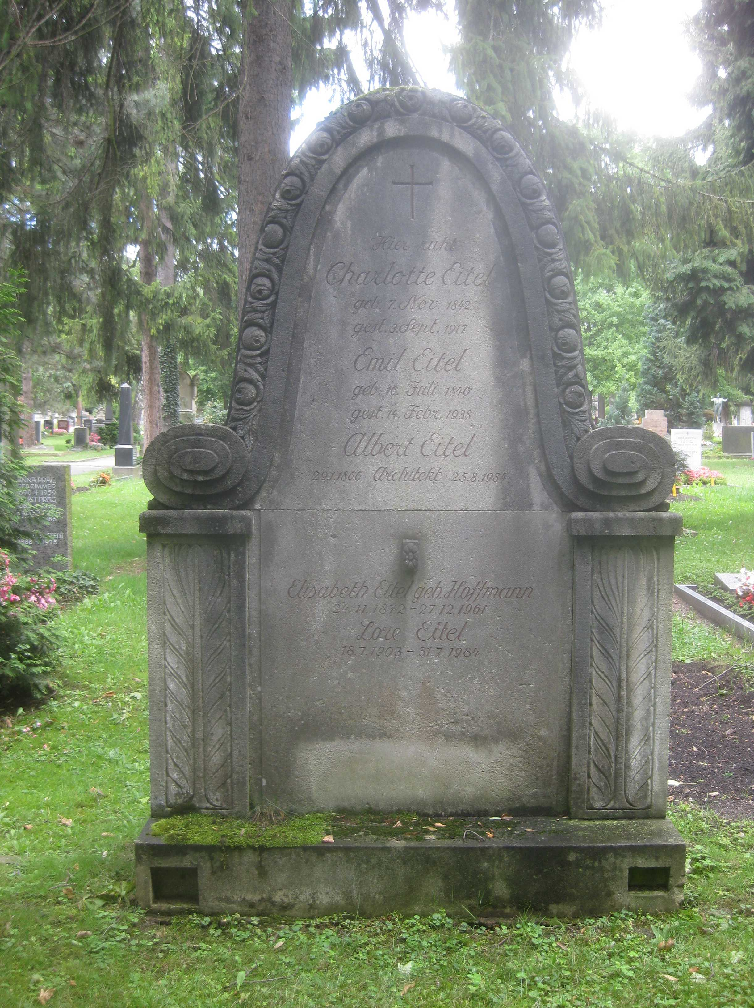 Grabstein der Familie Eitel auf dem Pragfriedhof in Stuttgart